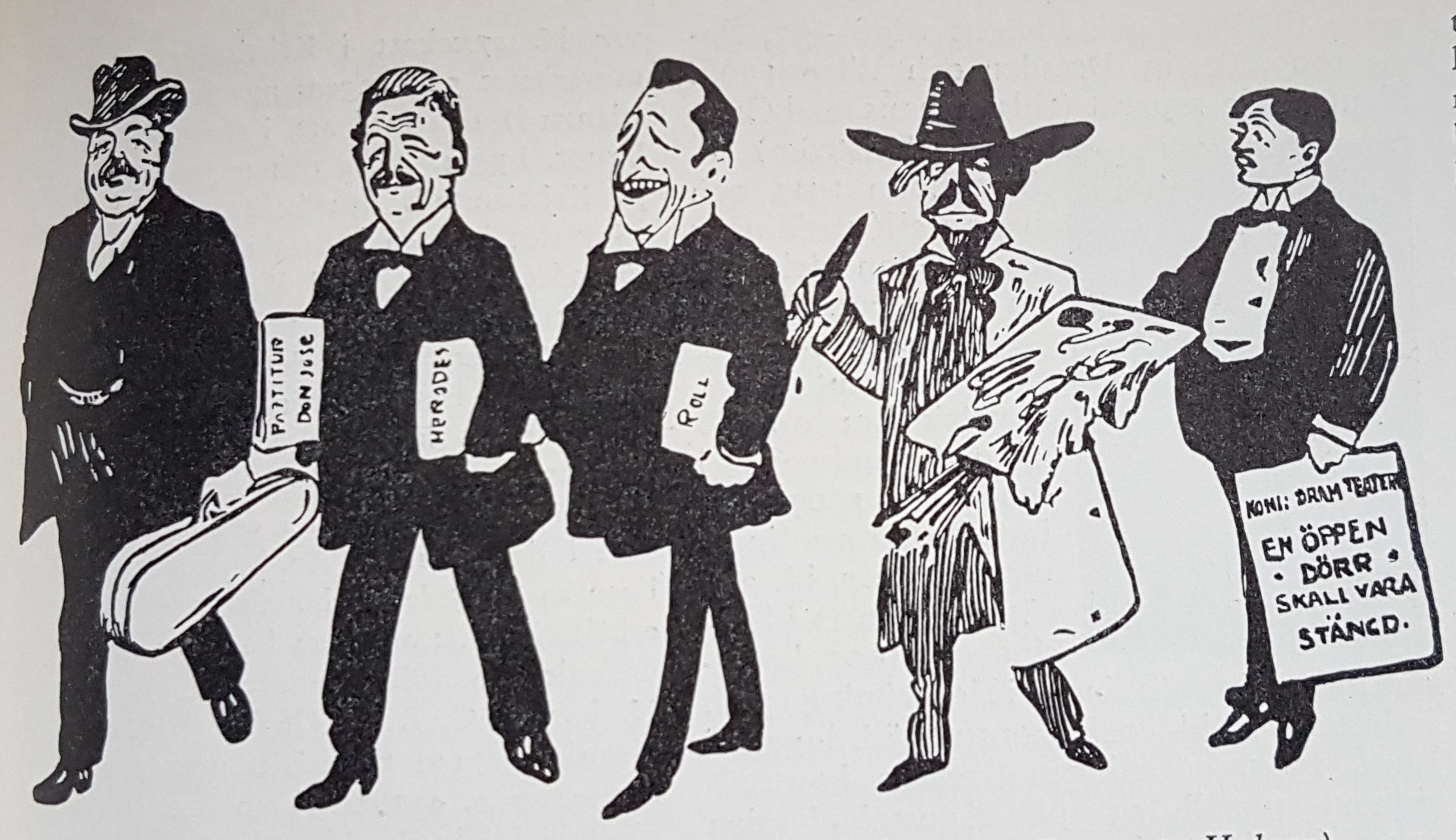 "Nyblomarna" Från vänster Carl-Göran Nyblom, Sven Nyblom, Knut Nyblom, Lennart Nyblom, Holger Nyblom från en teckning införd i Dagens Nyheter 1908. Avfotograferad bild från Allhems Svenskt konstnärslexikon.